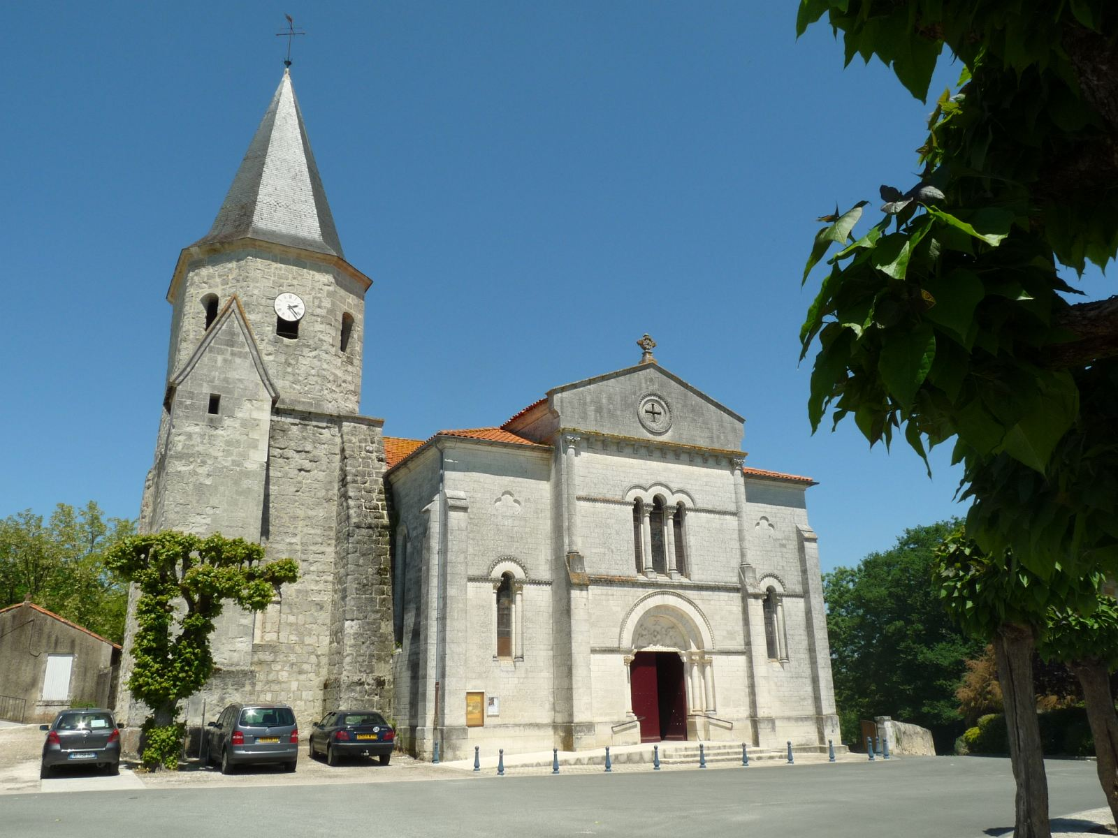 église de St-Aigulin, Charente-Maritime, France